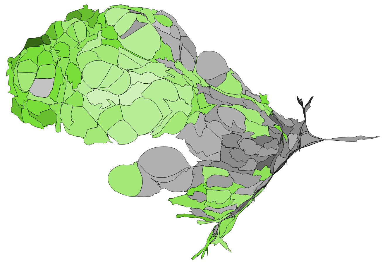 顏色對照表